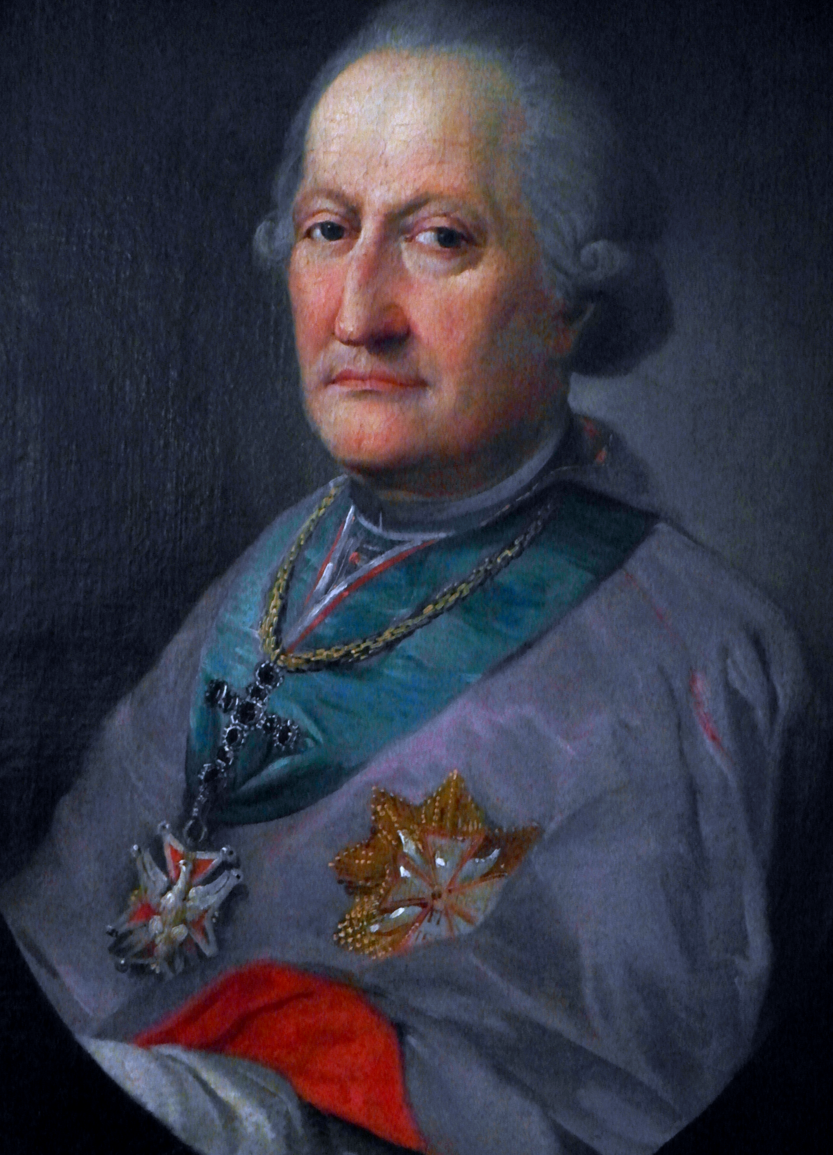 Portrait of Feliks Paweł Turski (1729-1800)